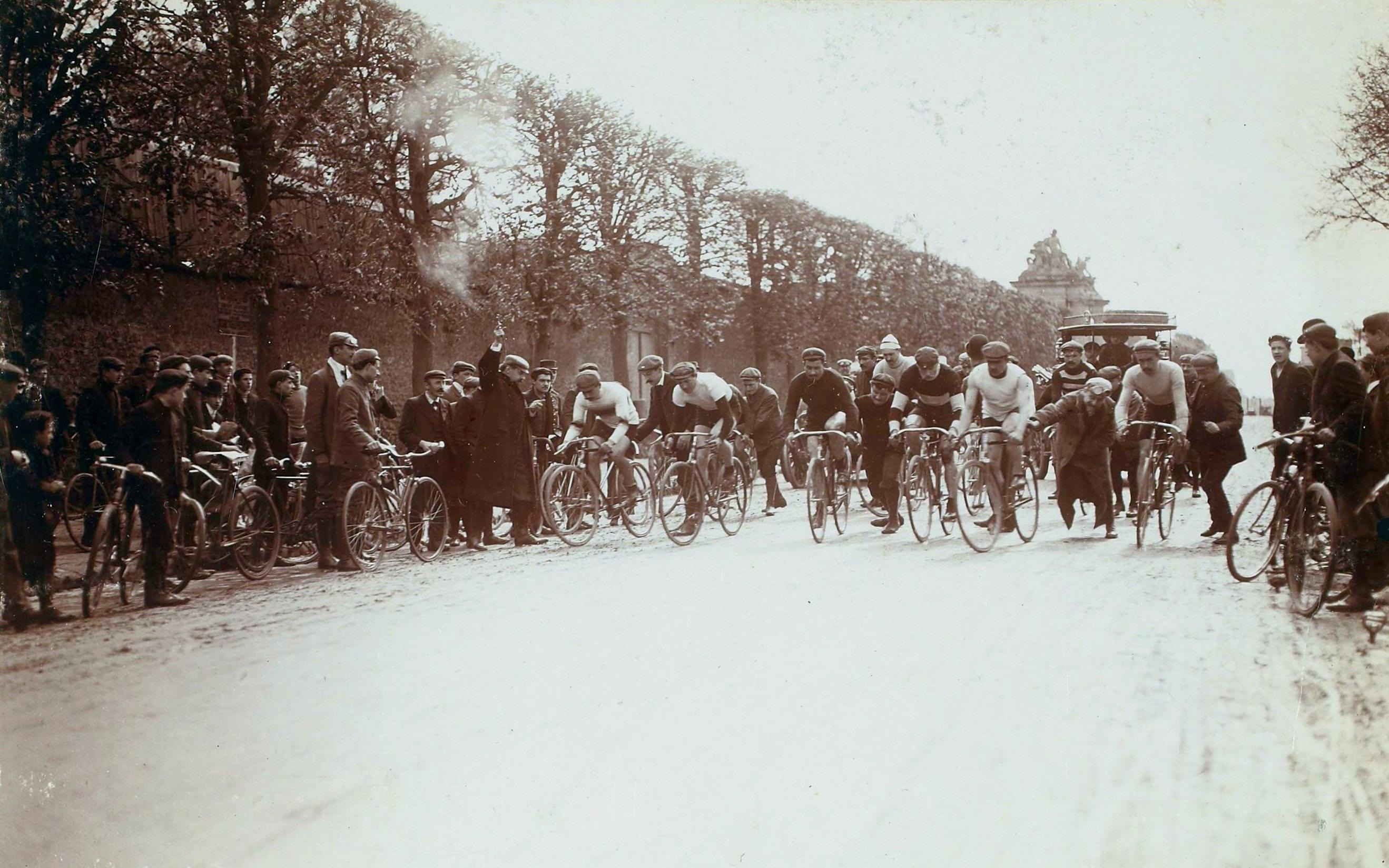 [Collection Jules Beau. Photographie sportive] : T. 33. AnnÃ©es 1906 et 1907 / Jules Beau